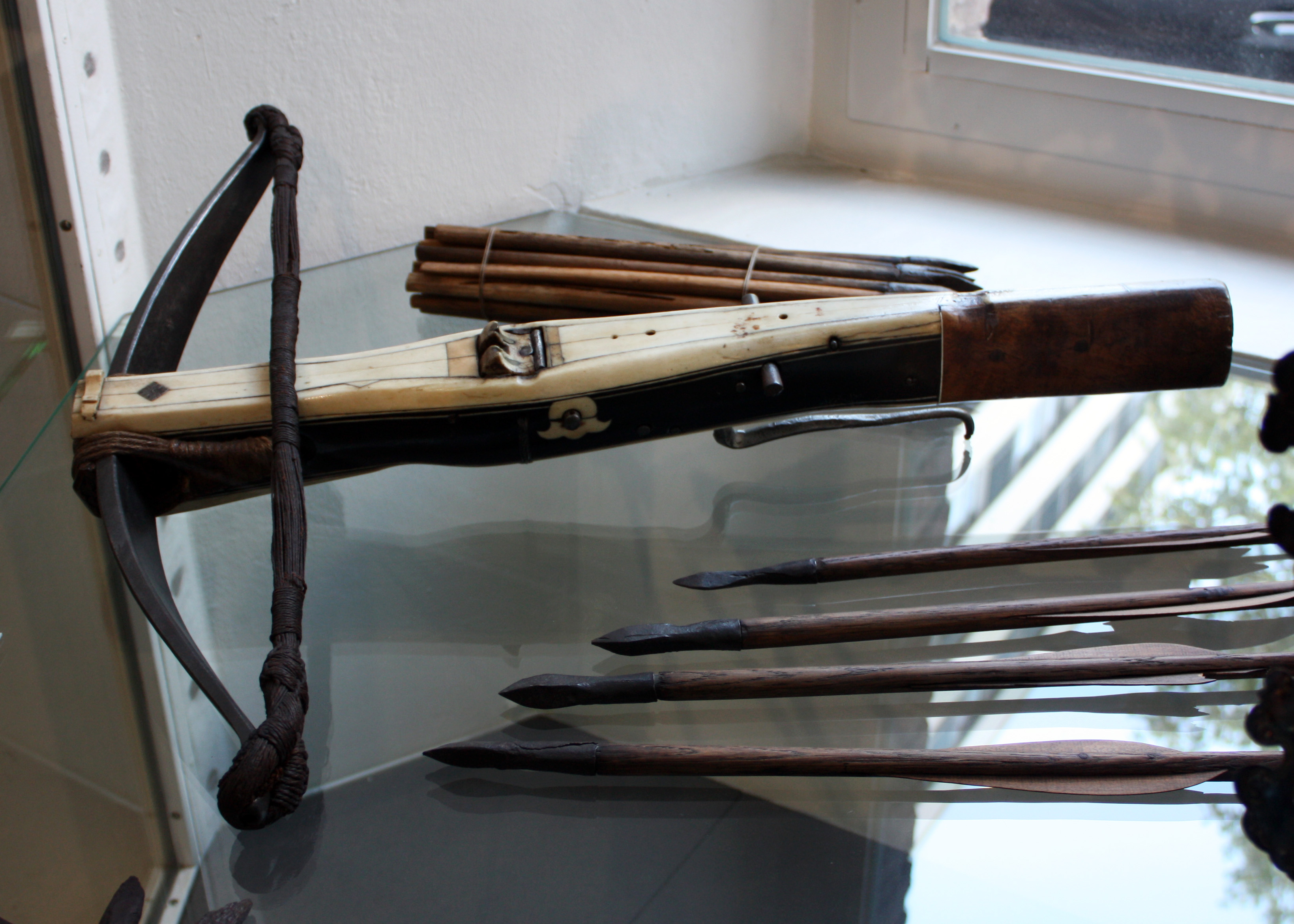 Waffengerät Kölner Schützen im Mittelalter Zeughaus-Köln.